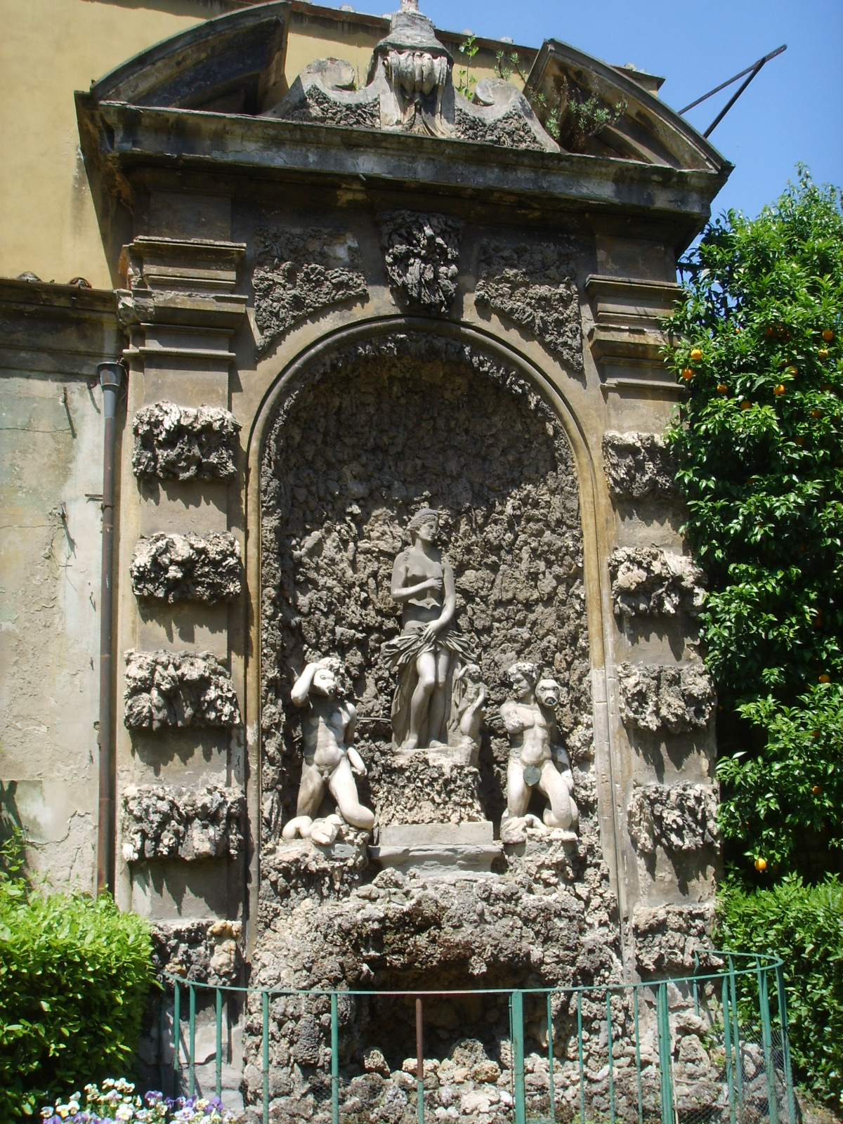 Palazzo Budini Gattai di Firenze; fontana del giardino. Le statue di Afrodite nascente dalle acque e dei Tritoni ai suoi lati sono di Giovanni Bandini.